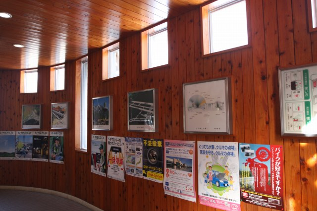 関越自動車道登り線側土樽PA内の関越トンネル概要を説明するパネル等